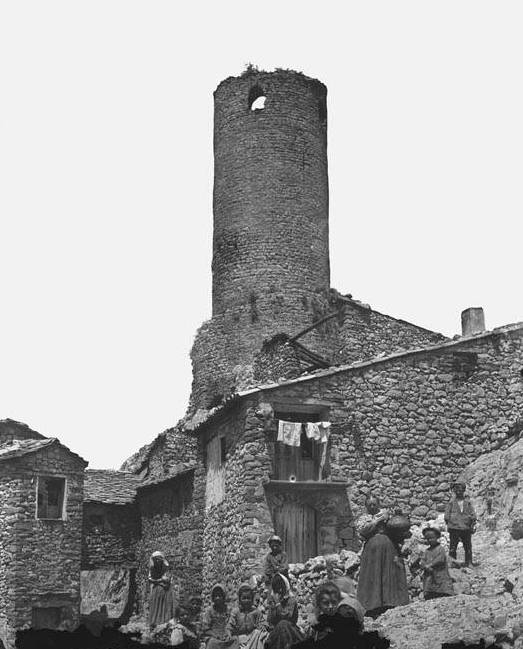 Imatge